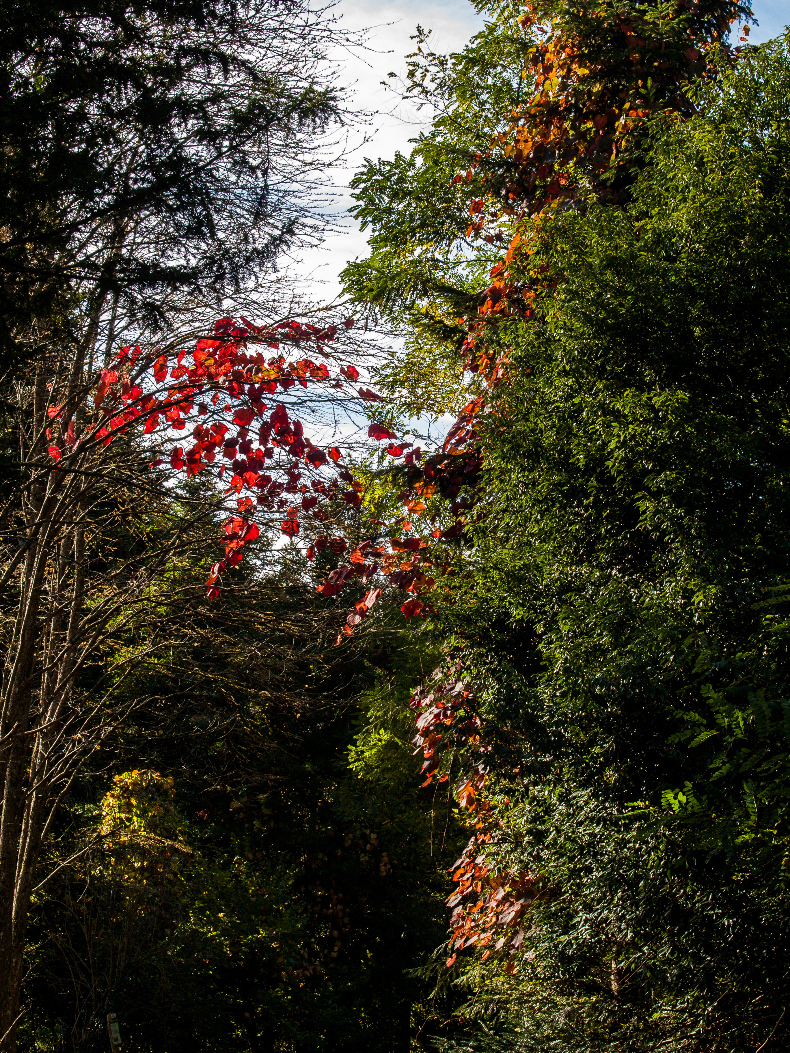 Wild-Rebe (Vitis vinifera subsp. sylvestris)